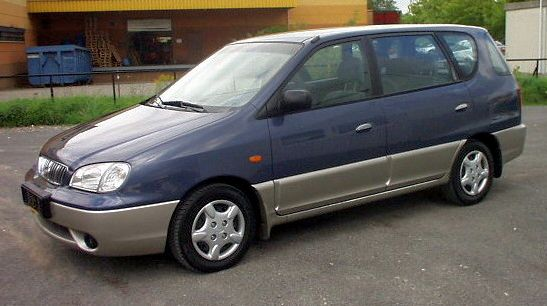 Kia Carens